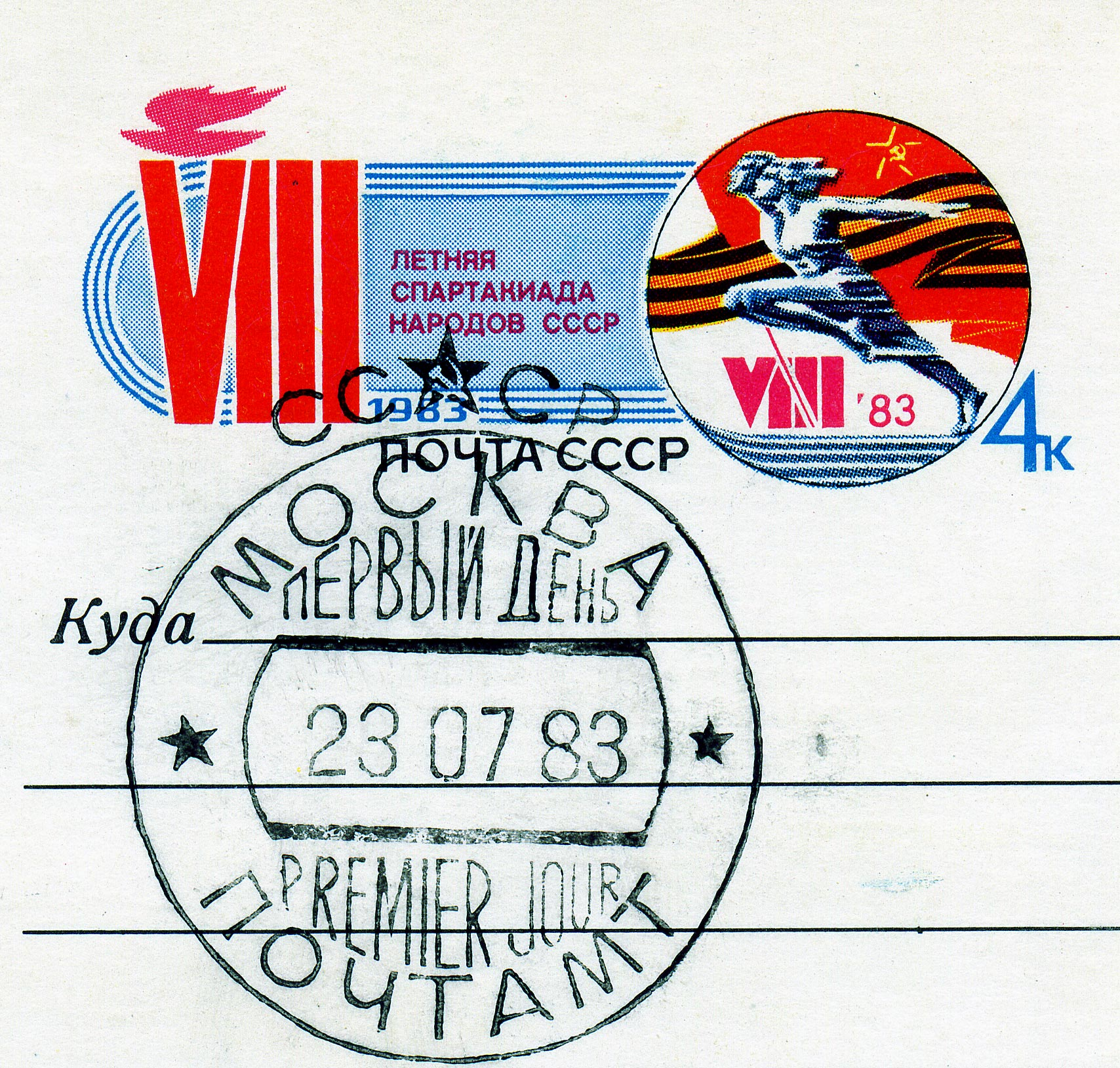 Почтовая марка СССР. 1983. VII Летняя Спартакиада народов СССР. Карточка целиком